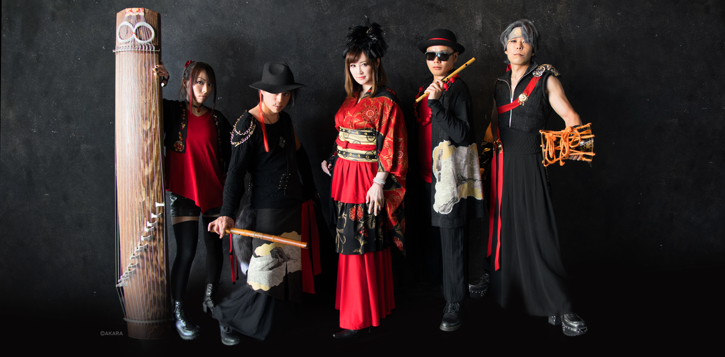 AKARA写真